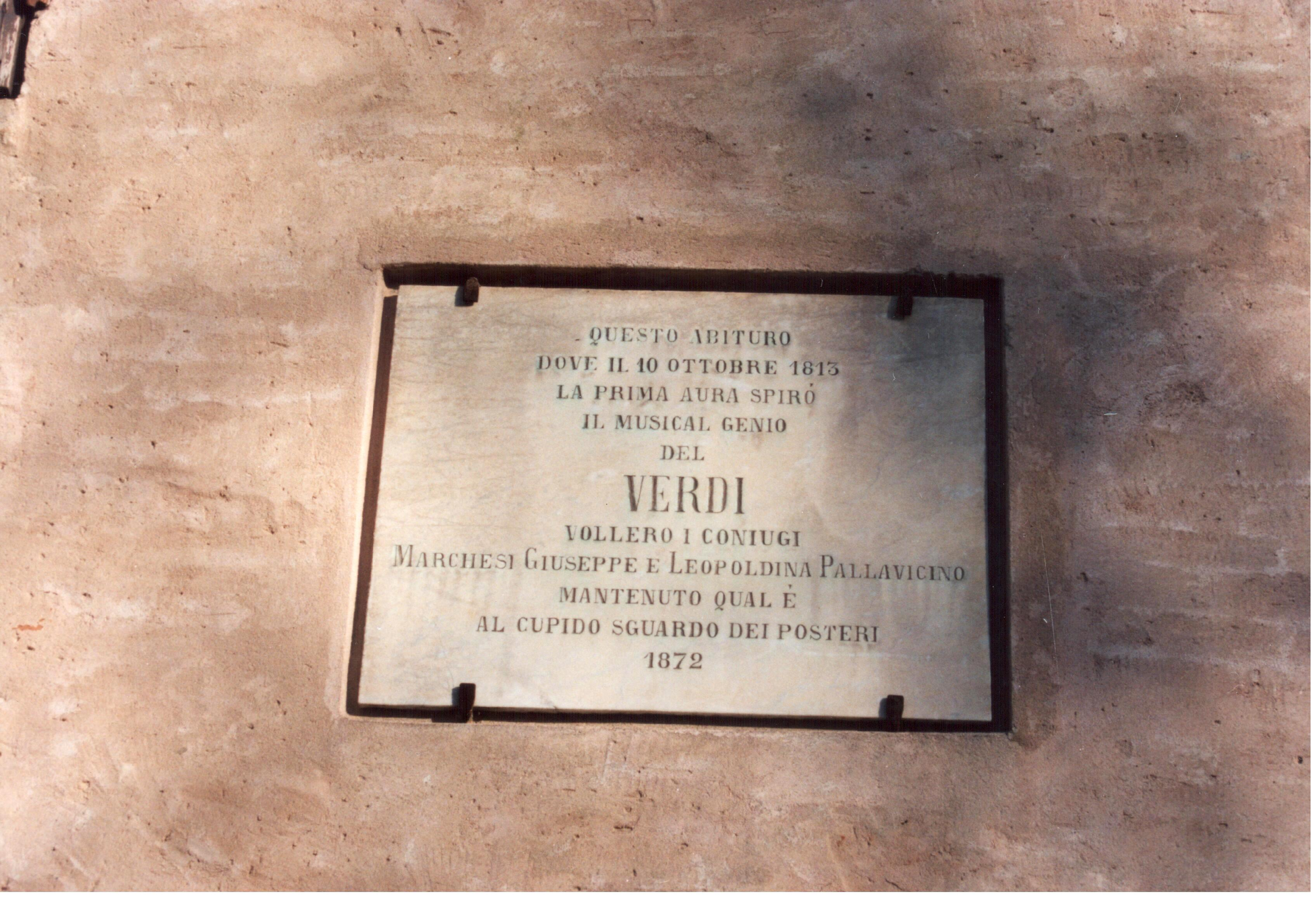 Casa natale di G. Verdi targa all'esterno della casa This is a photo of a monument which is part of cultural heritage of Italy.